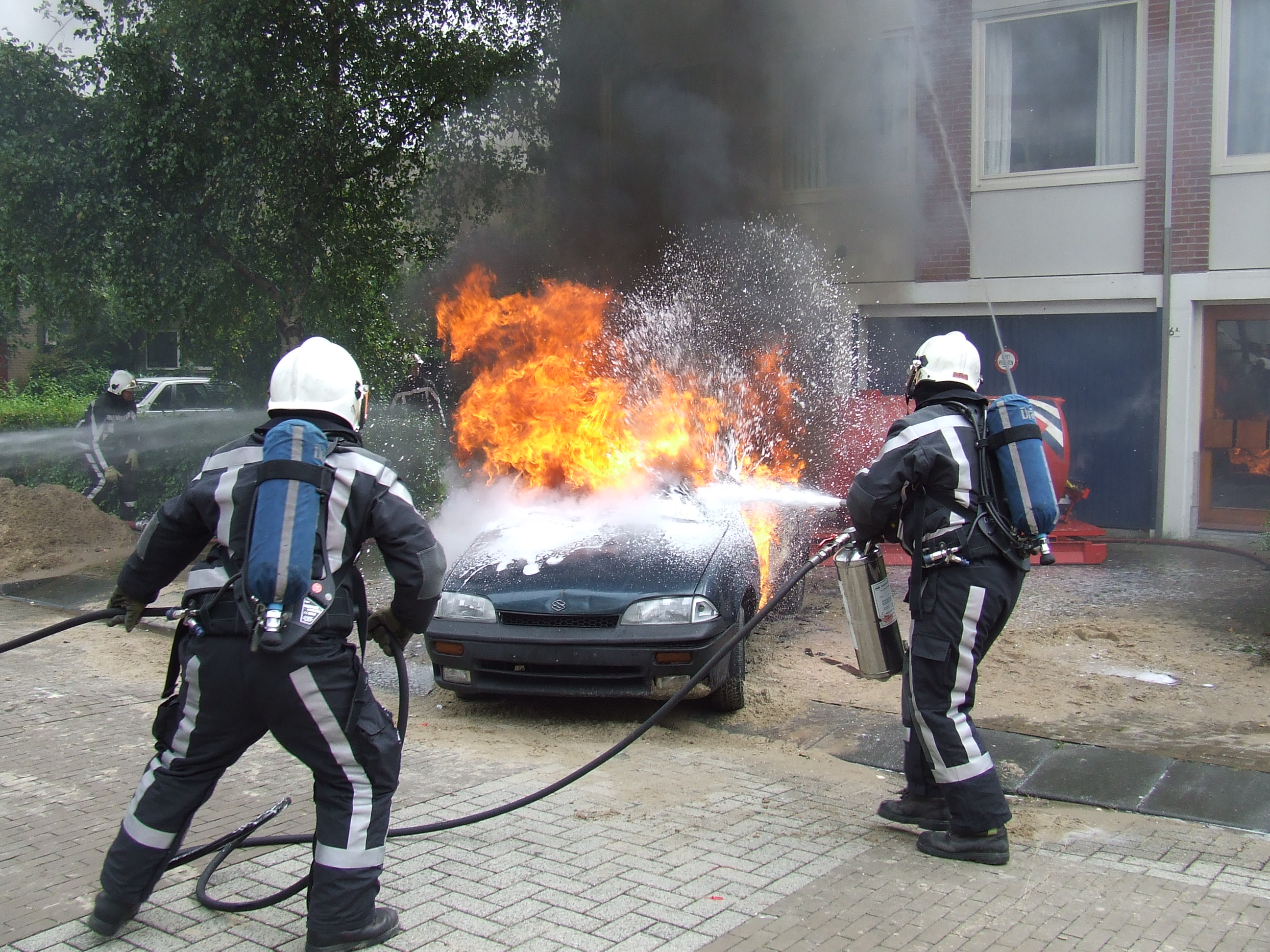 Brandweermannen blussen een autobrand